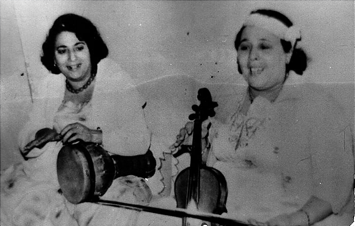 Zhour Fergani - fkiret et benoutet de Constantine